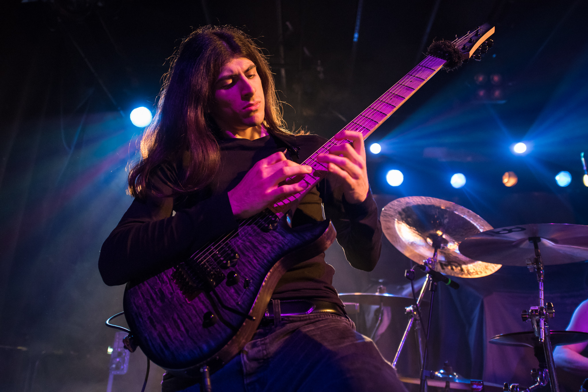 Concertbüro Franken,Der Hirsch,Konzert,Livekonzert,Livemusik,Obscura,Rafael Trujillo